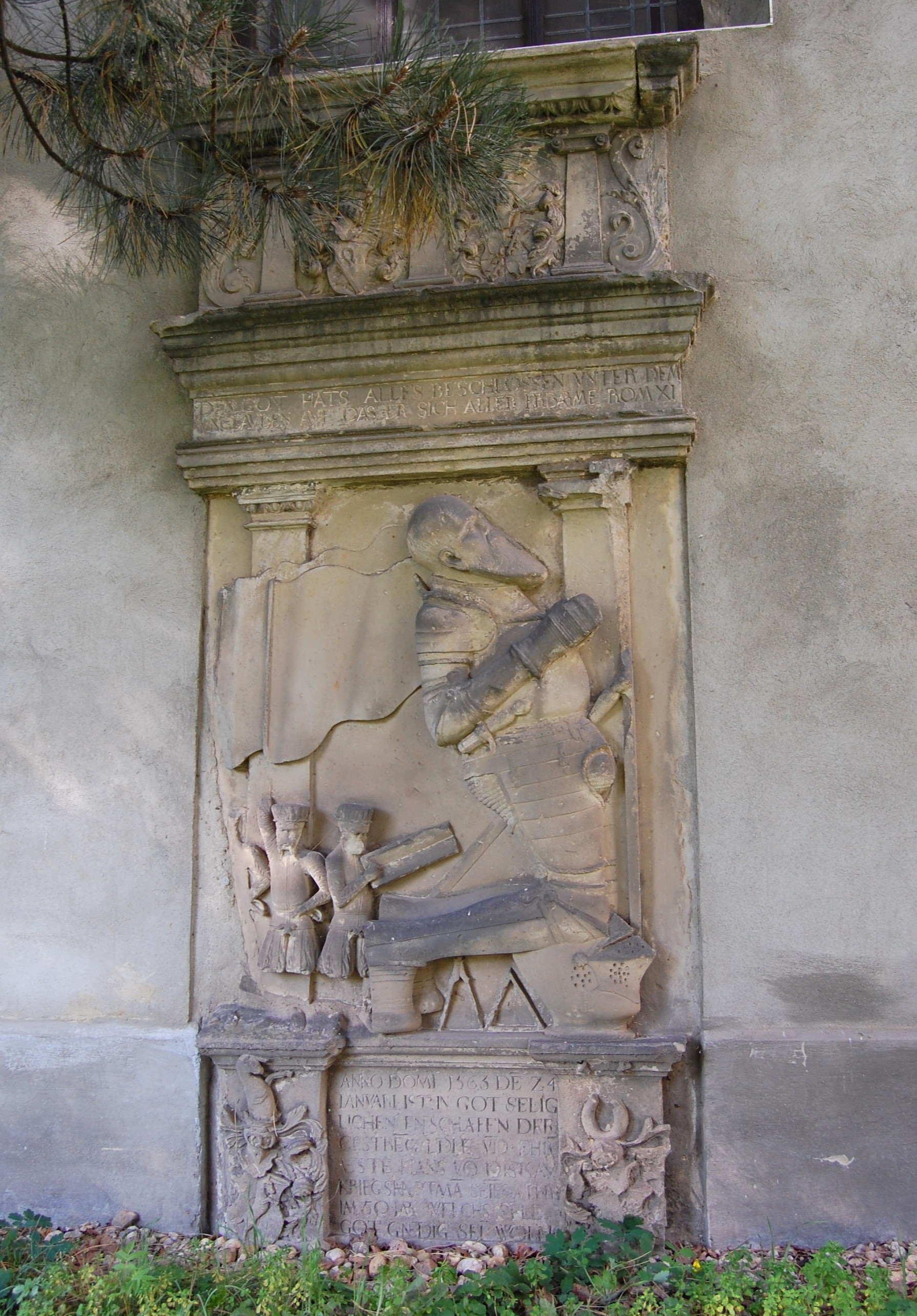 Epitaph für Hans von Dieskau (verstorben 1536) an der Ostwand der Sankt-Anna-Kirche Lochau, Relieffigur des Verstorbenen in Rüstung